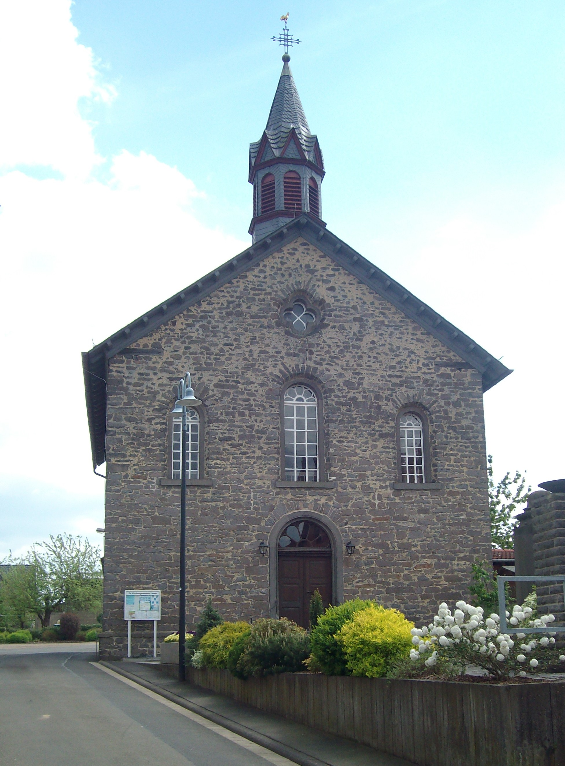 Evangelische Kirche Lumda, Grünberg, Landkreis Gießen, Hessen, Deutschland